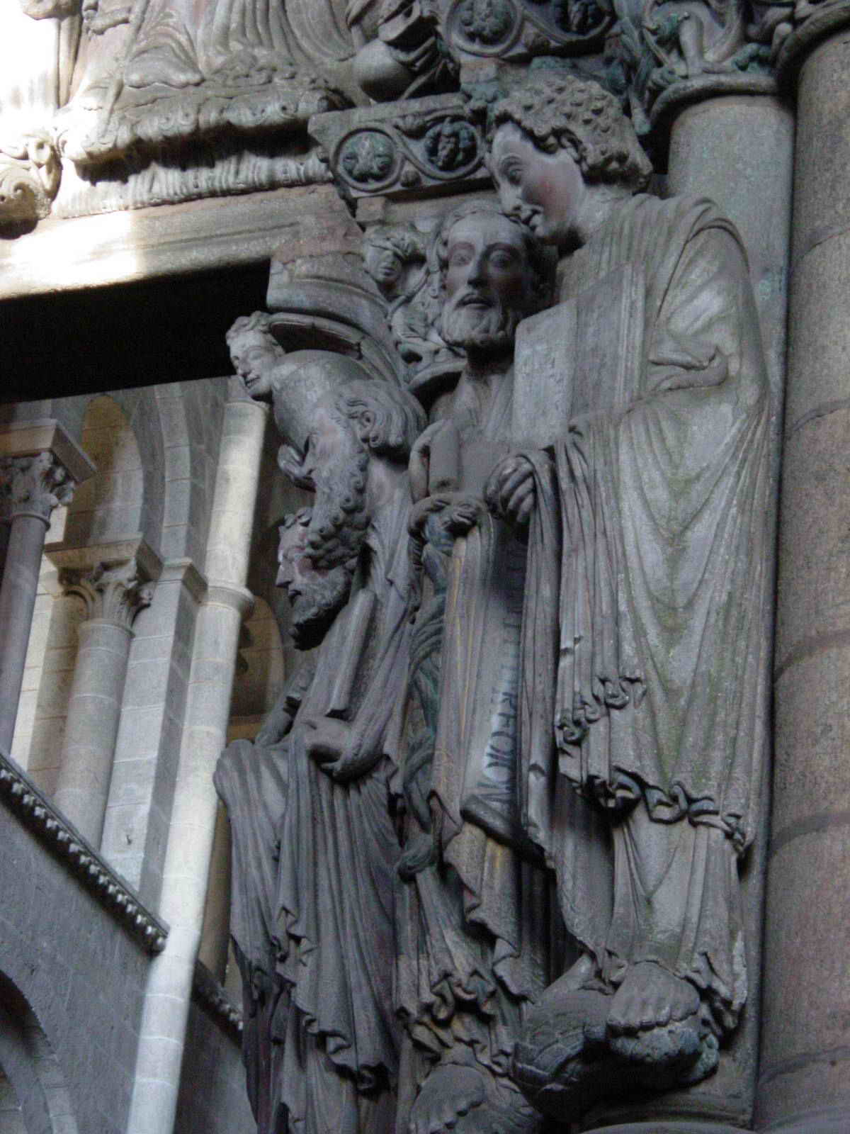 Santiago de Compostela - Galicia - España (Spain)